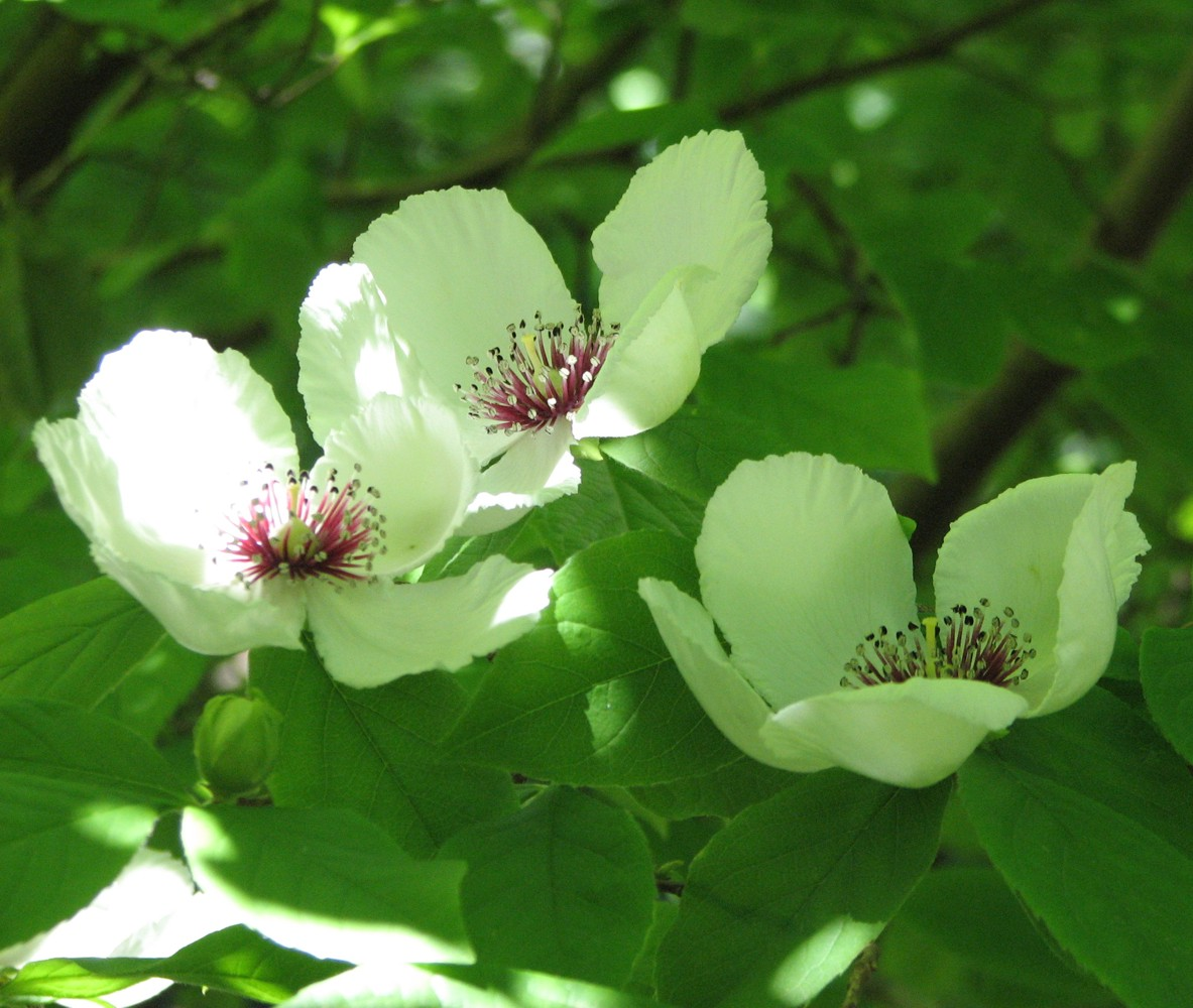 Stuartia malacodendron, Pirianda Garden, Mt Dandenong, Victoria, Australia